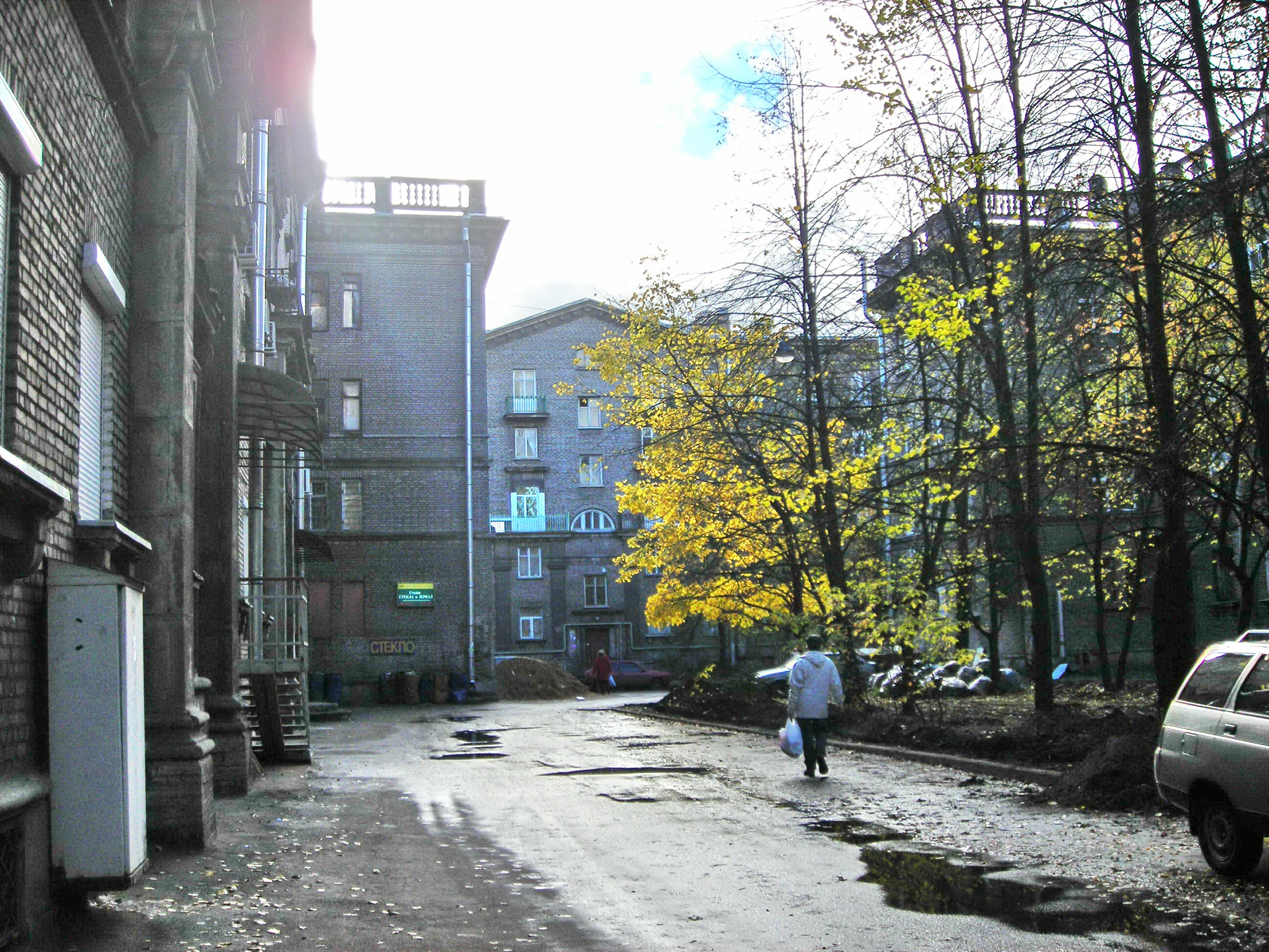 Sestroretskaya street, Spb